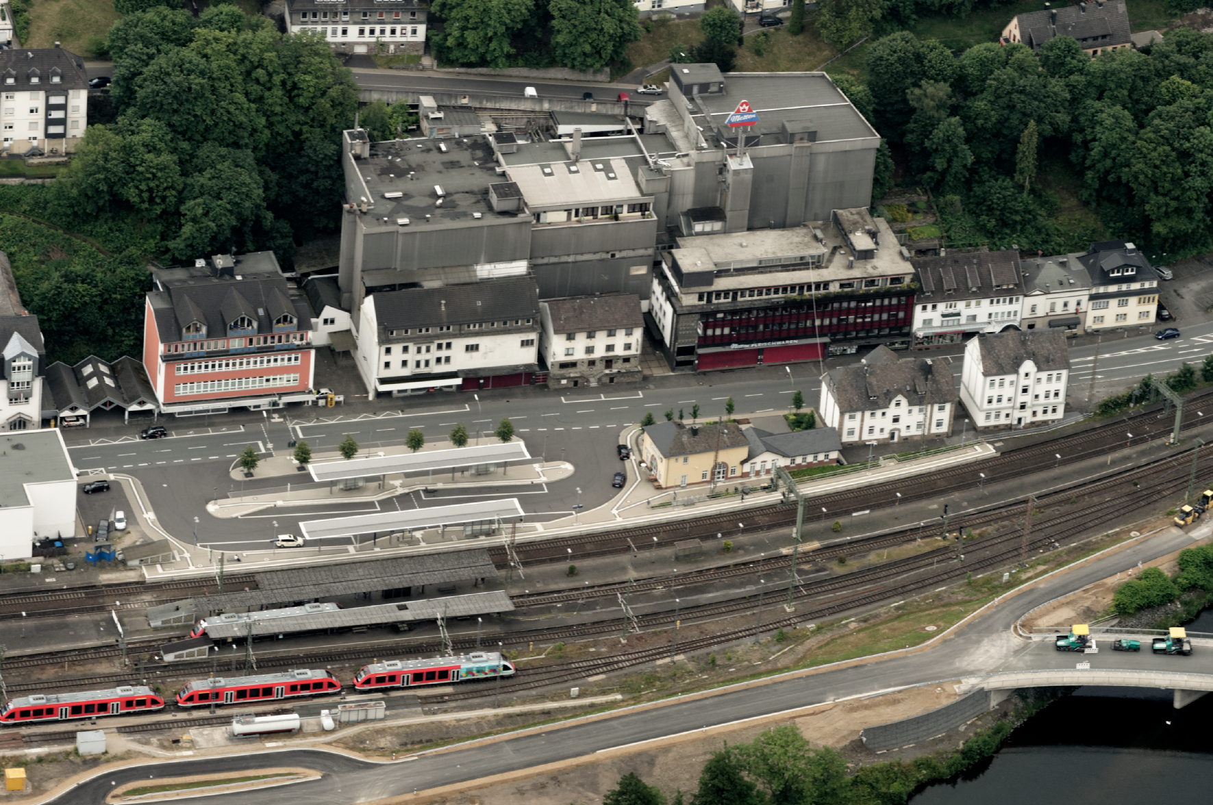 Fotoflug Sauerland Nord. Teilansicht Finnentrop mit Metten und Bahnhof. The making of this document was supported by the Community-Budget of Wikimedia Germany.